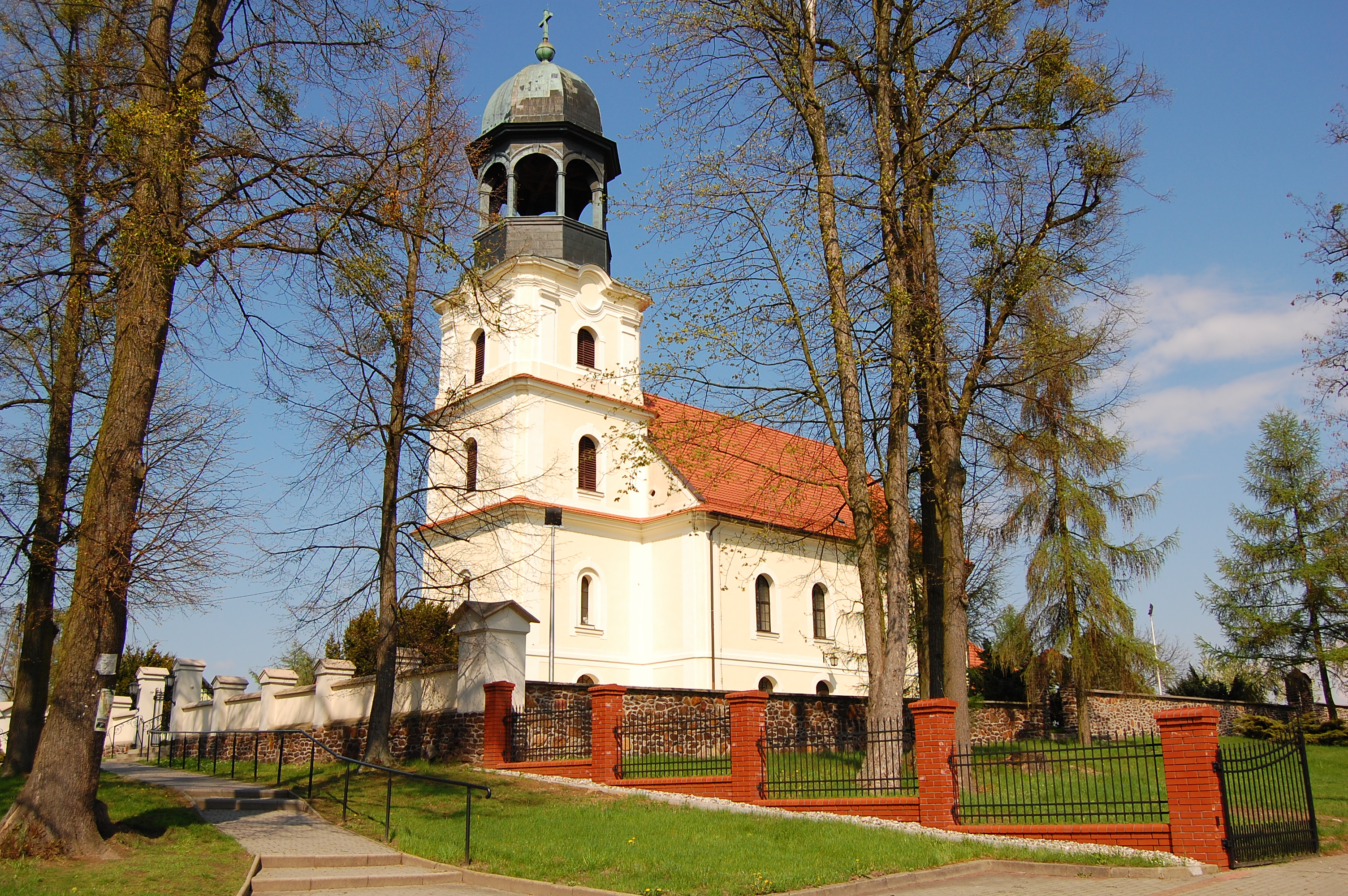 Biskupice, kościół ewangelicki, ob. rzym.-kat. p.w. św. Jacka, 1784